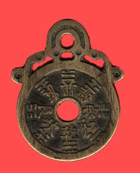 Chinese amulet met daarop de 8 trigrammen van de Yijing, laat 19e of vroeg 20e eeuw